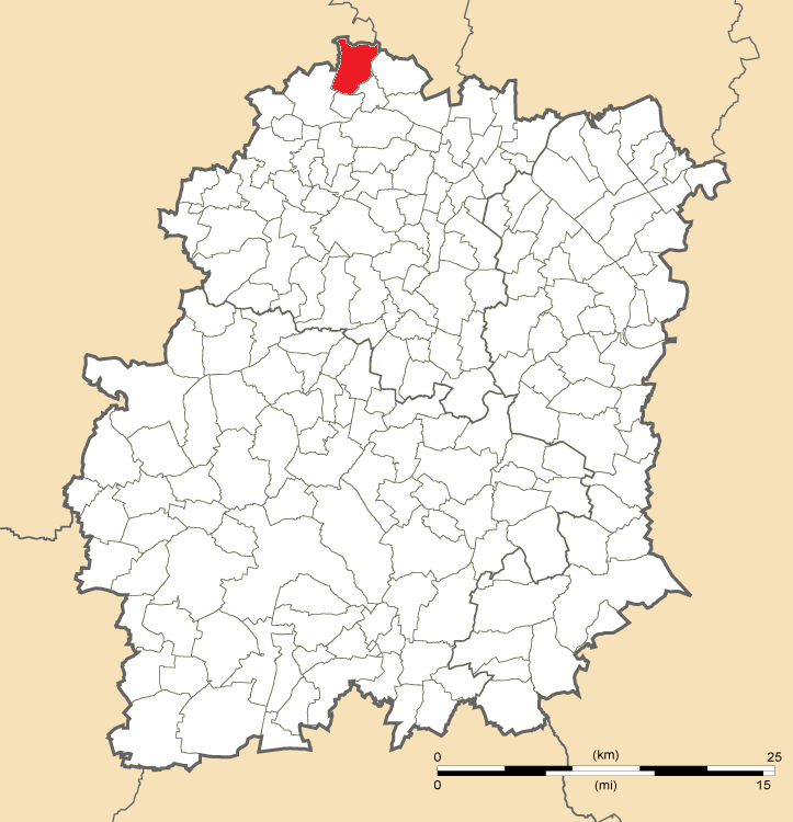 Carte de position de Bièvres en Essonne.